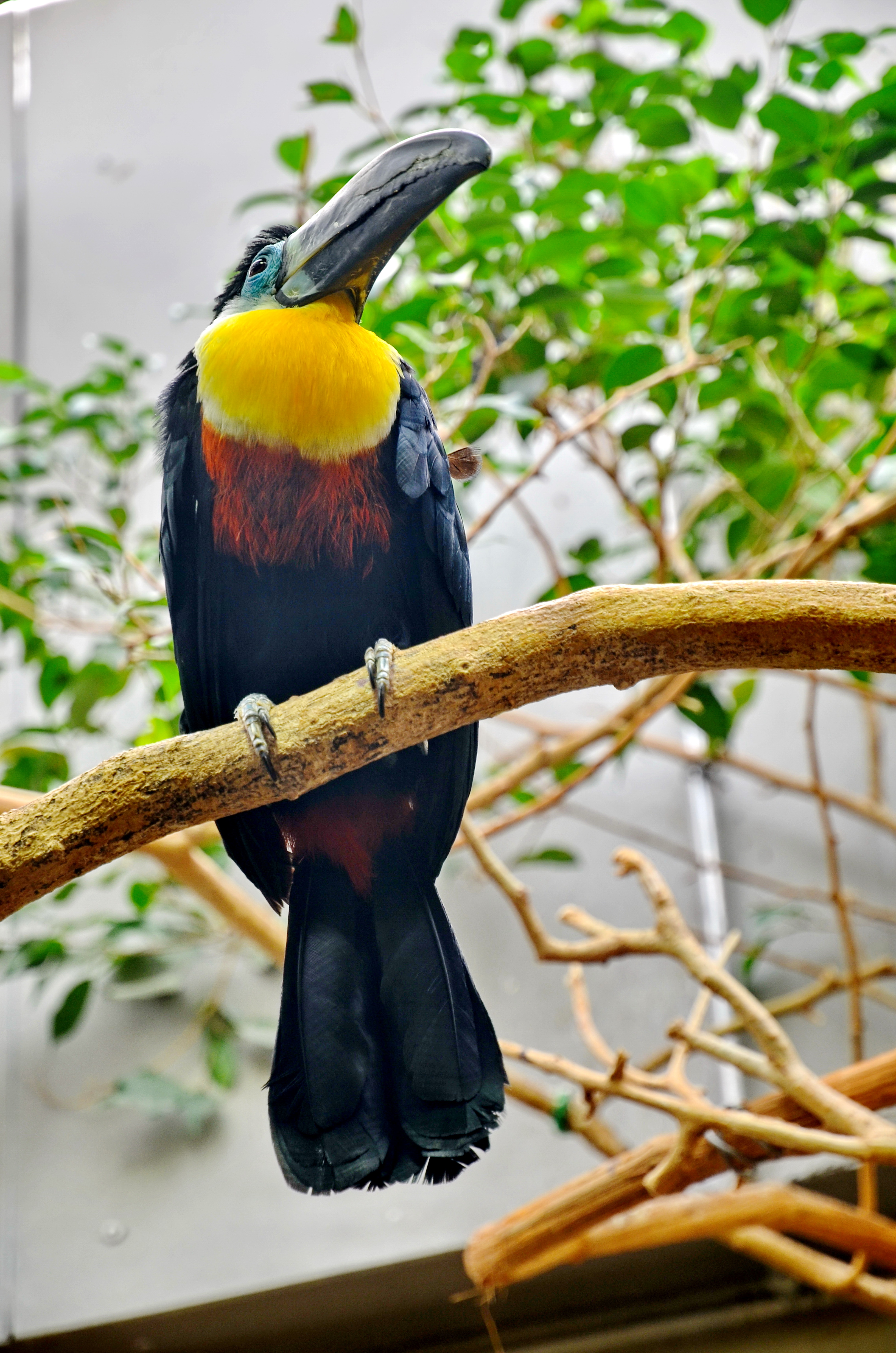 Voliere, Arboretum in Zürich-Enge (Switzerland)